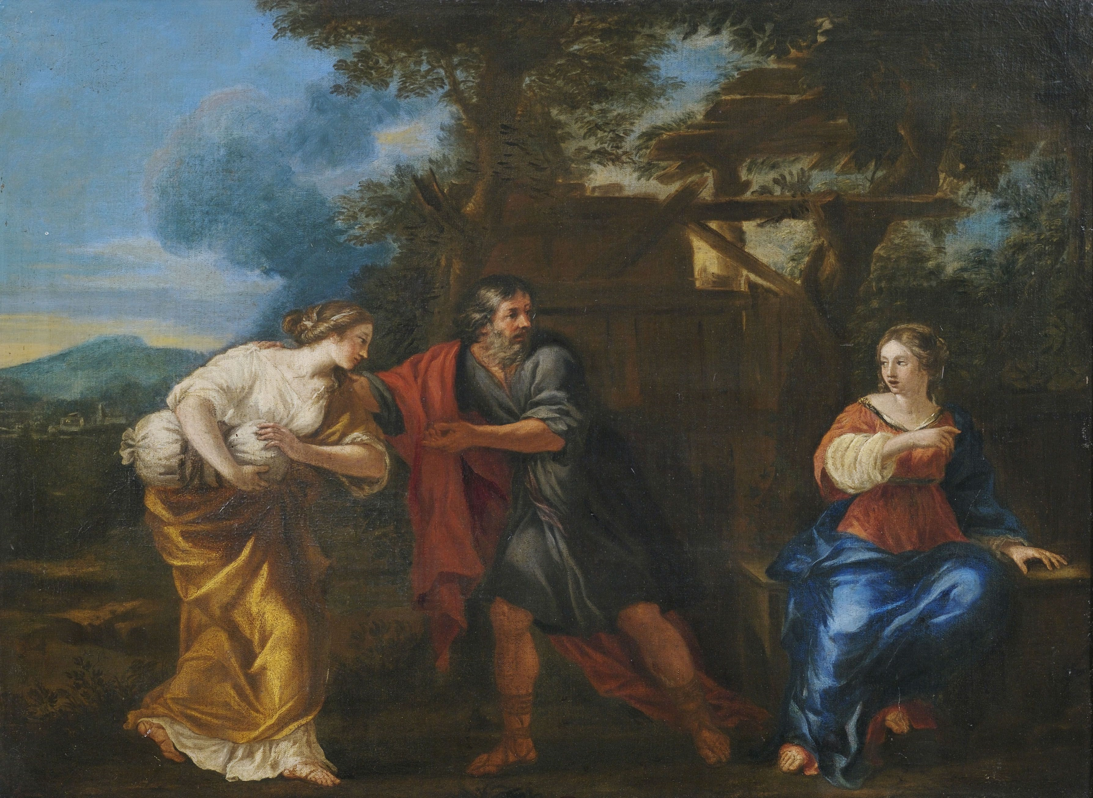 Lot und seine Töchter. Öl auf Leinwand. 72 x 96 cm.